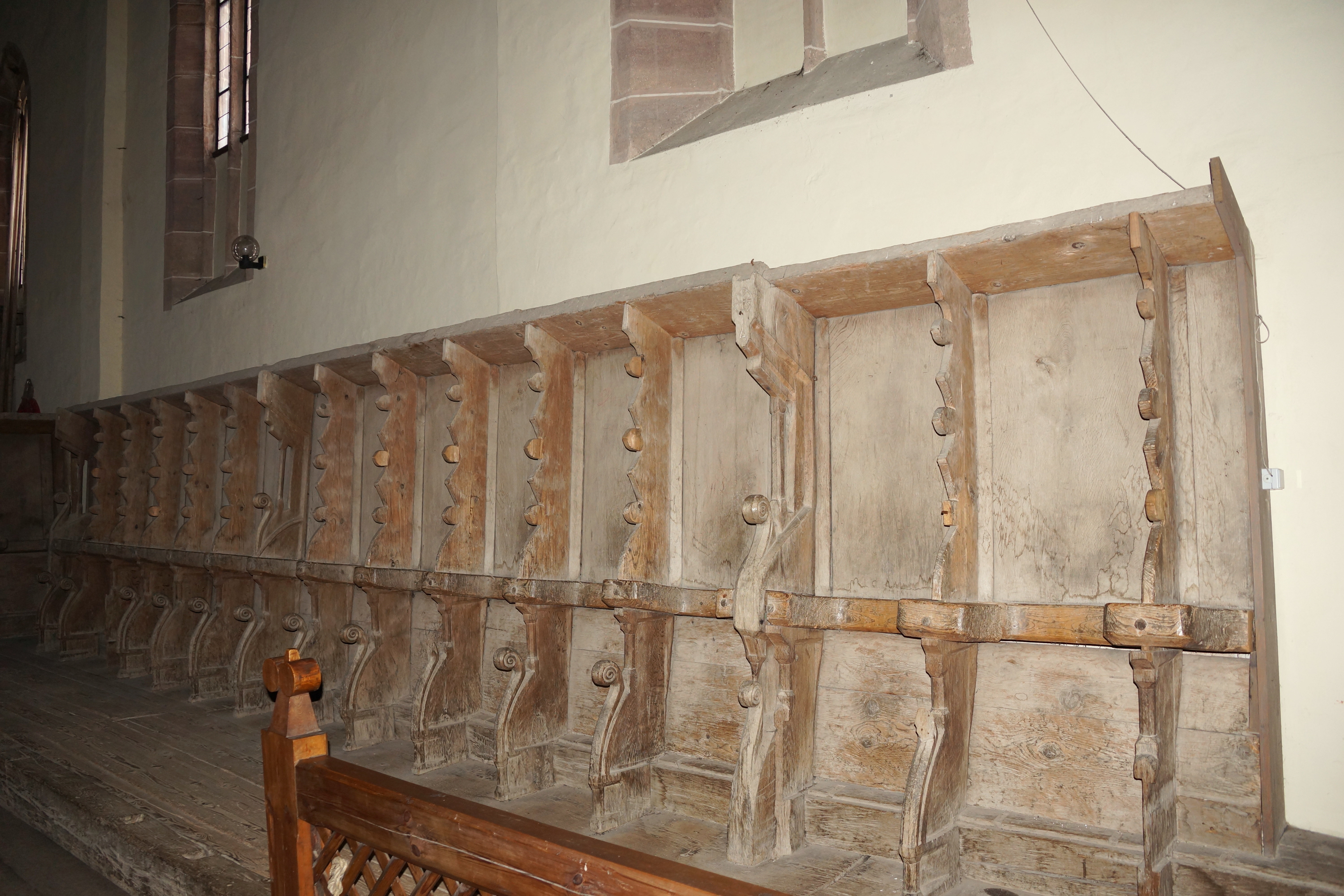 Kloster Seligenporten (Kreis Neumarkt in der Oberpfalz)